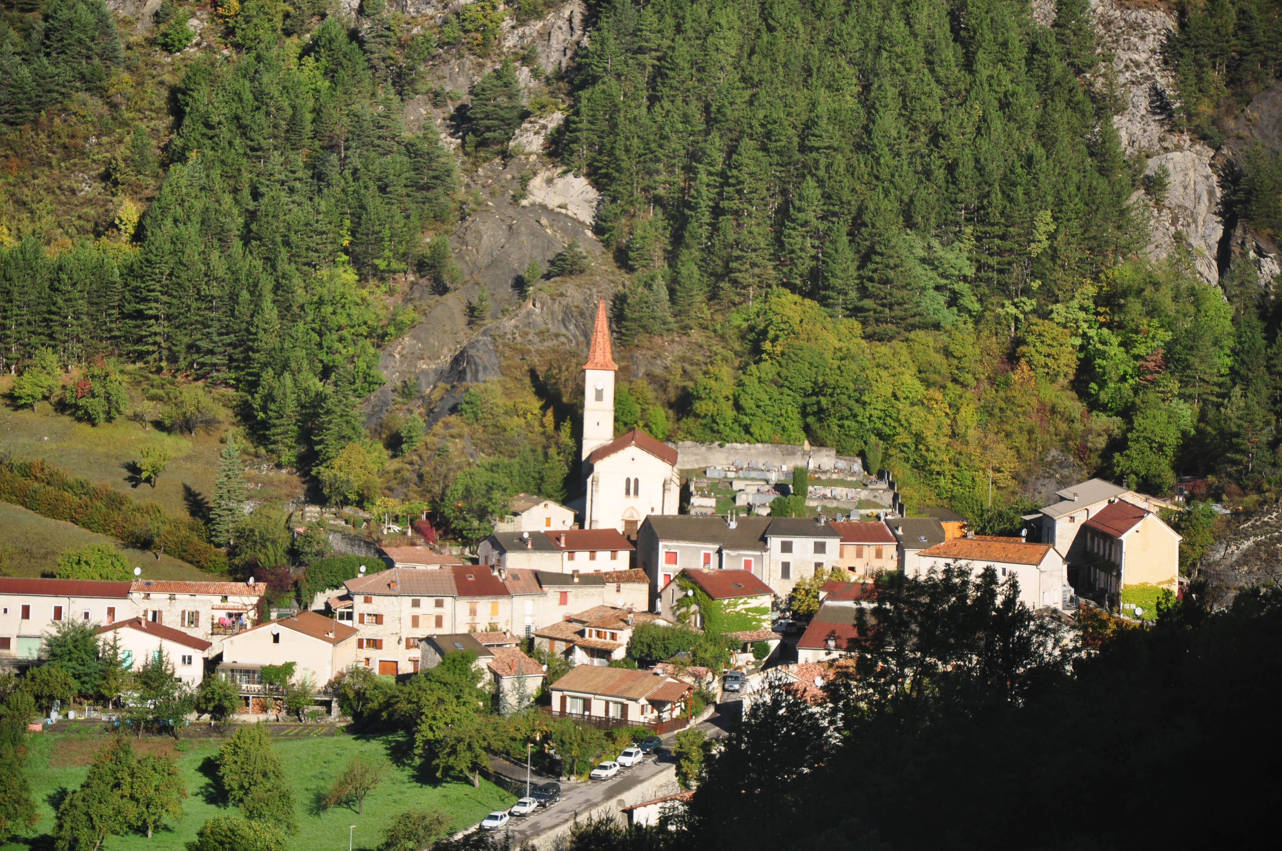 Prads-Haute-Bléone, le village